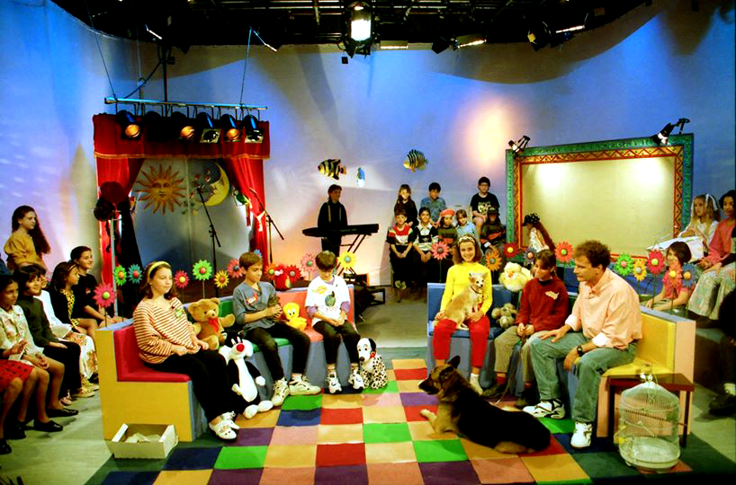 דליק ווליניץ מנחה בערוץ הילדים